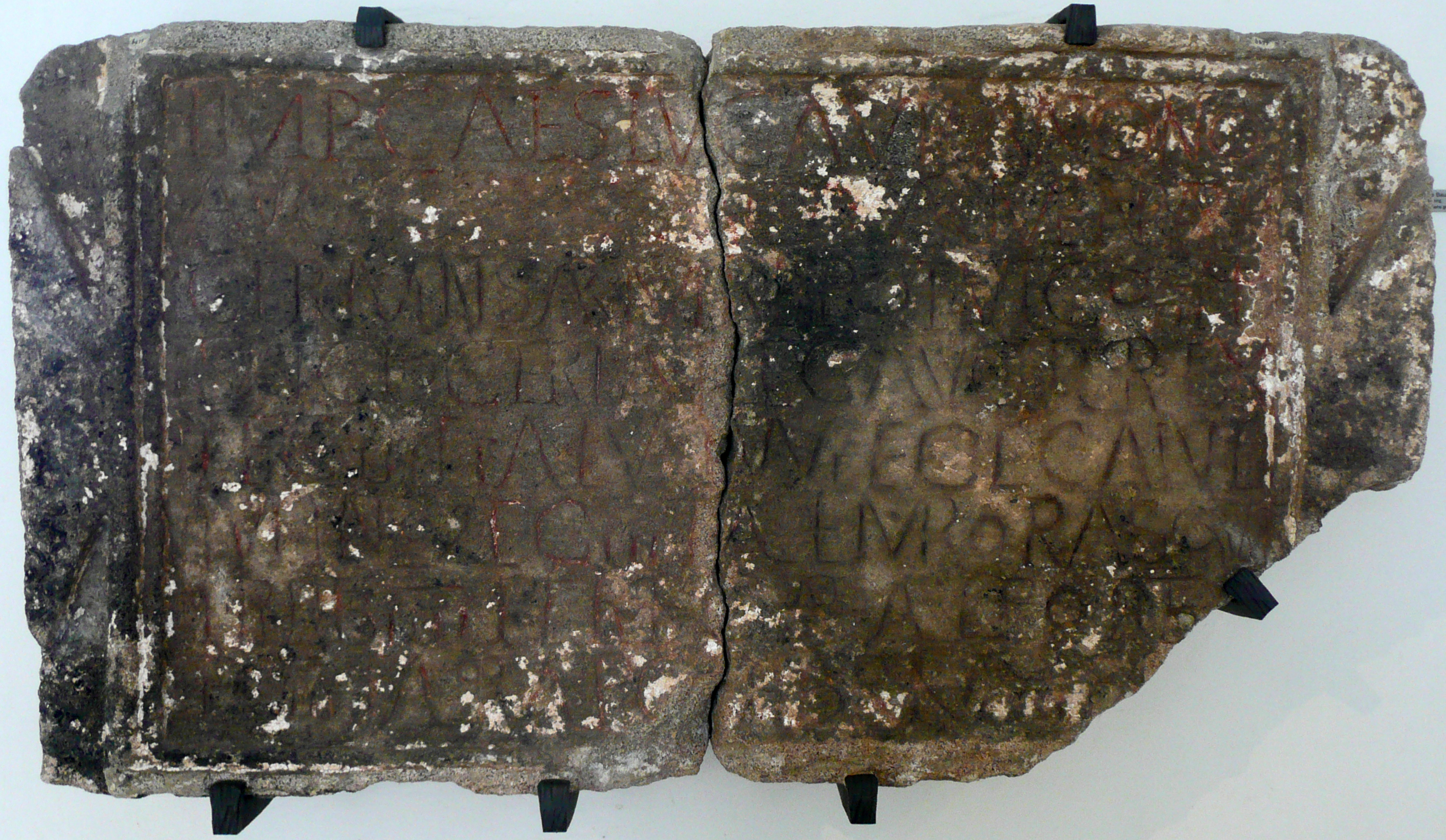 CIL 03, 14370,02 Imp(eratore) Caes(are) Luc(io) Aur(elio) Antoni(n)o Aug(usto) [Commodo] Armen(iaco) Parth(ico) Germ(a)n(ico) Sarm(atico) trib(unicia) pot(estate) VI co(nsule) III p(atre) p(atriae) Spicio Ceriale leg(ato) Aug(usti) pr(o) pr(aetore) vex(illarii) leg(ionis) III Ital(icae) vallum fece(runt) c(uram) a(gente) Iul(io) Iulino (centurione) leg(ionis) III Ital(icae) item portas cum turrib(us) IIII perfec(tas) ab Ael(io) Forte (centurione) leg(ionis) III Ital(icae) praep(osito) coh(ortis) I Br(eucorum) imp(eratore) III Bur[ro co(n)s(ulibus)]